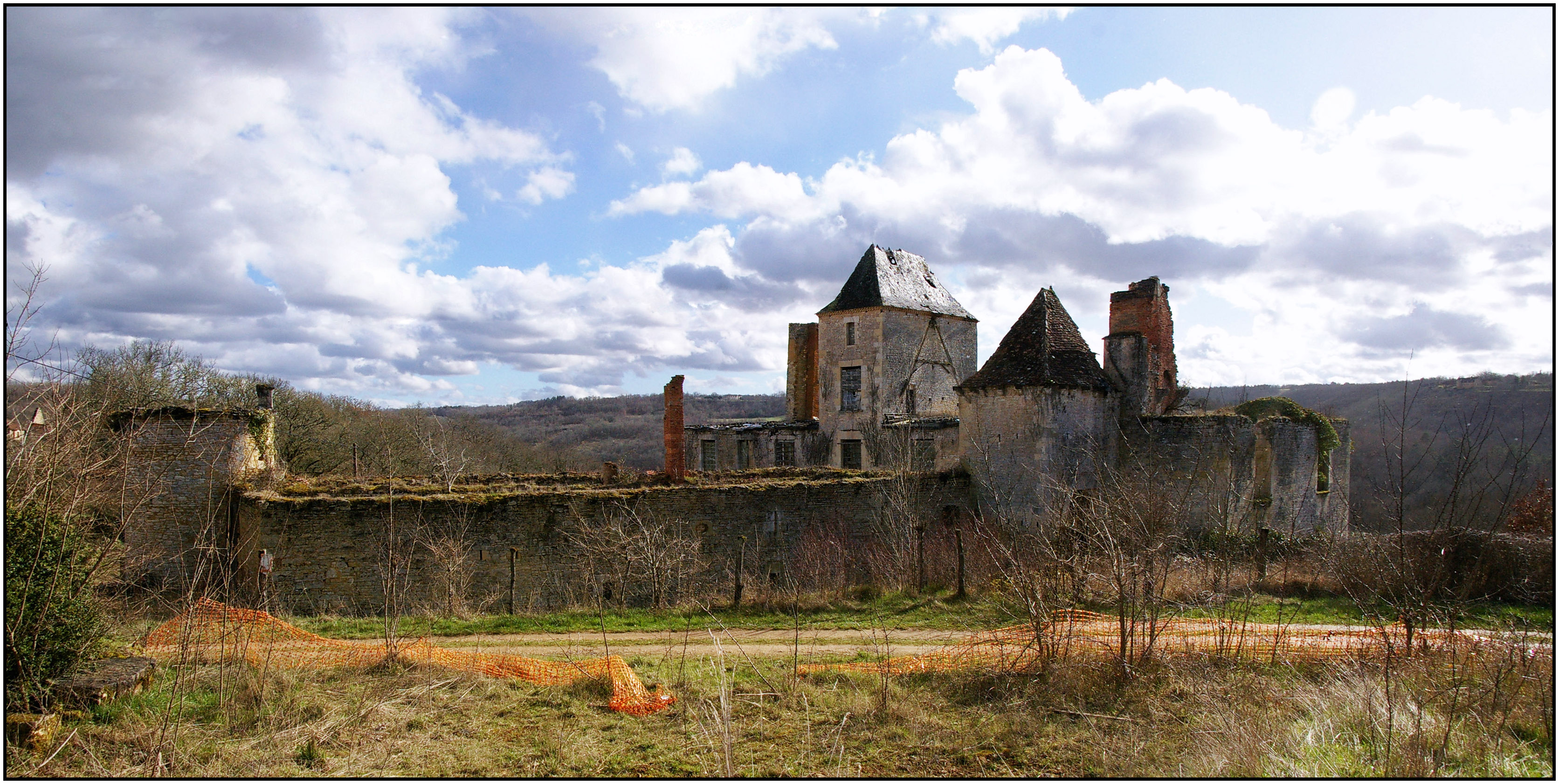 Château du Repaire (Inscription), Saint-Aubin-de-Nabirat.